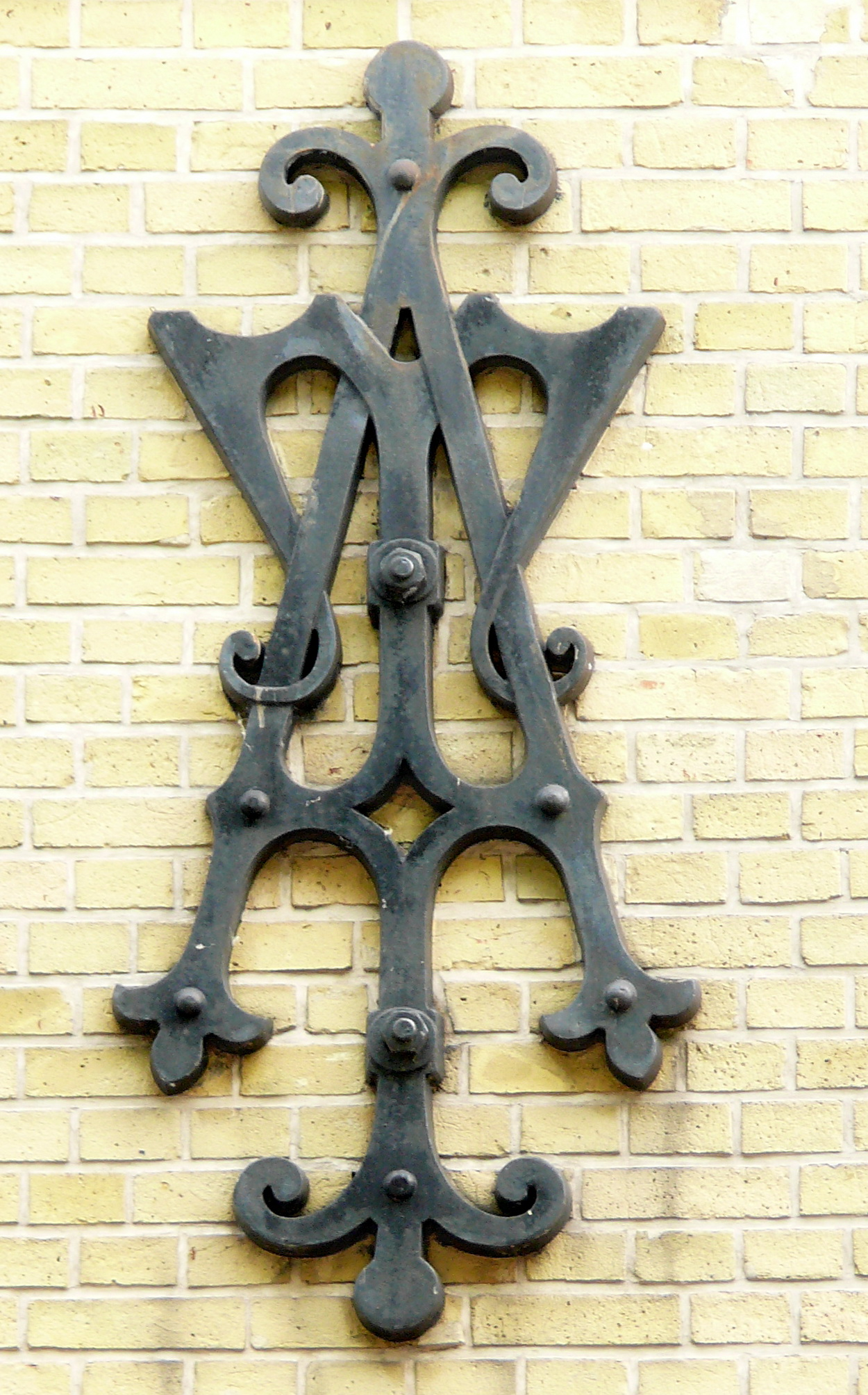 Tramway d'Amiens - ancre de tirant aux initiales T.A du bâtiment de l'ancienne usine électrique du tramway, Boulevard du Cange